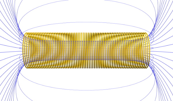 Solénoïde parcouru par un courant éléctrique. Les lignes du champ magnétique sont représentées en bleu.